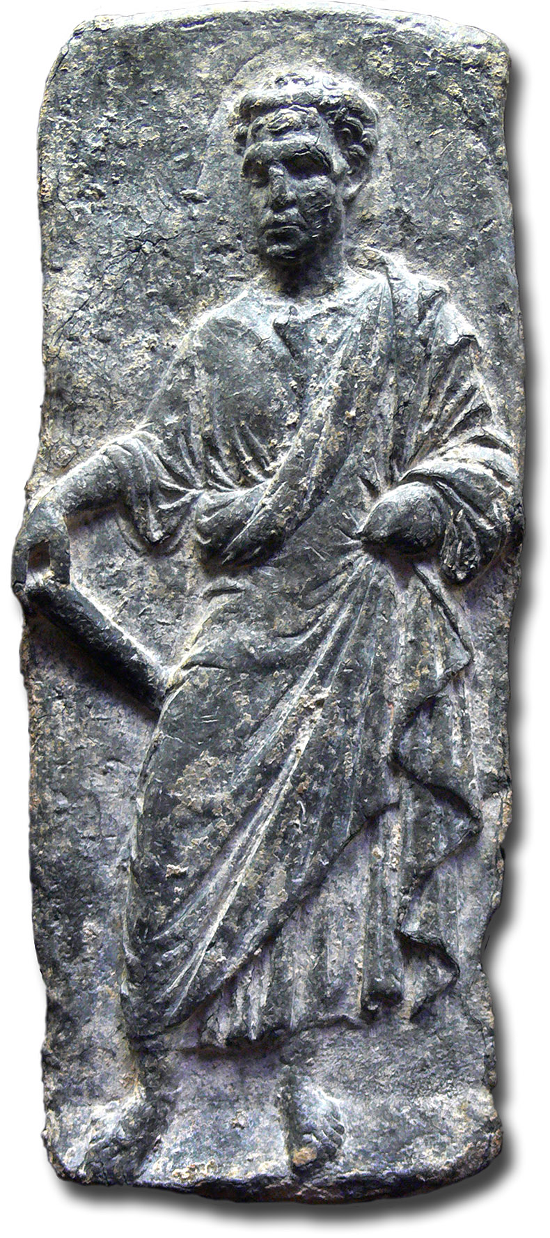 Apôtres ou prophètes, bas relief de plomb (un sur deux présentés au musée) Photographié au Musée national du moyen-âge - thermes et hôtel de Cluny (photographie autorisée dans le musée et l'exposition, avec une restriction : sans flash).